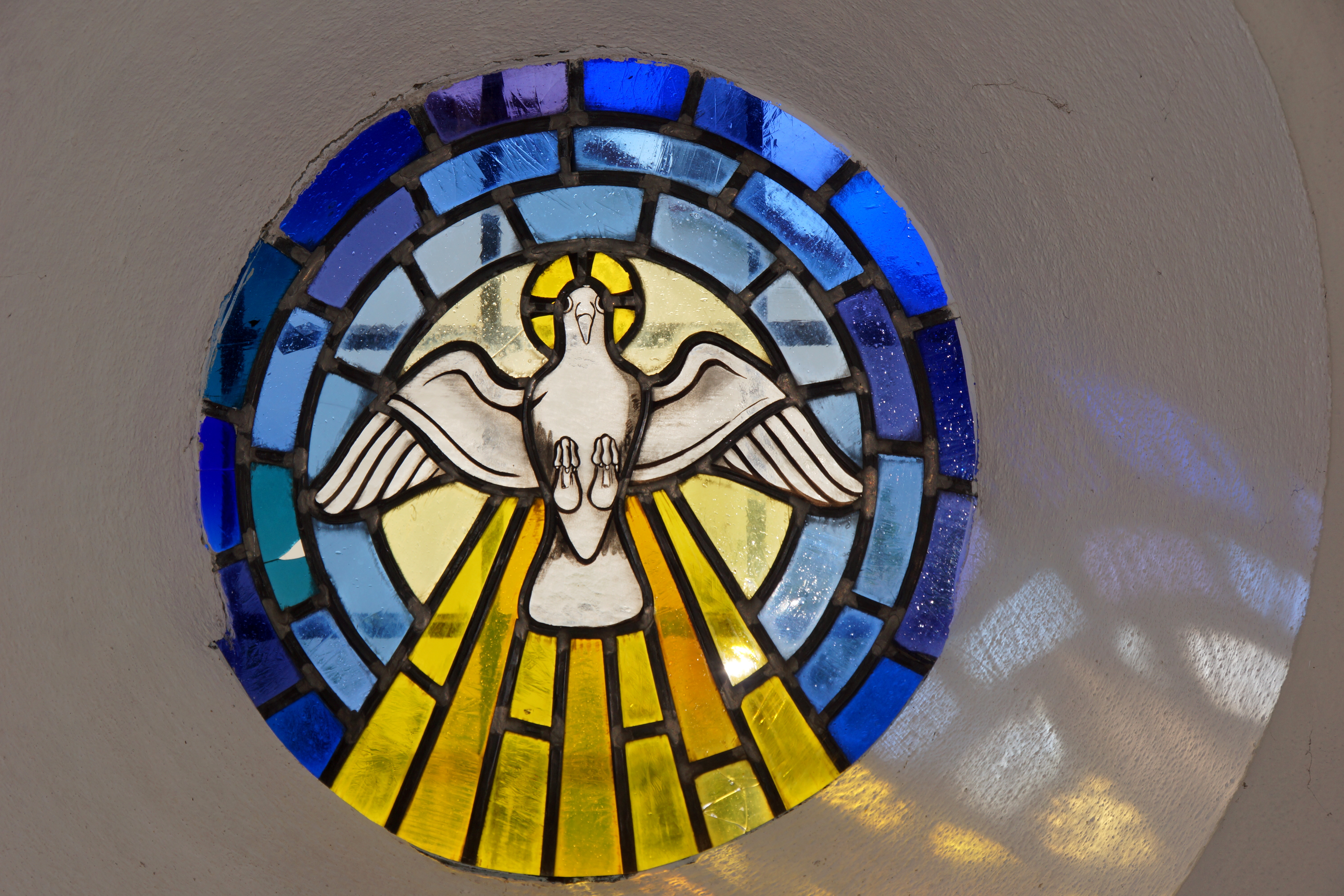 Die katholische Pfarrkirche Mariä Aufnahme in Daßwang bei Seubersdorf